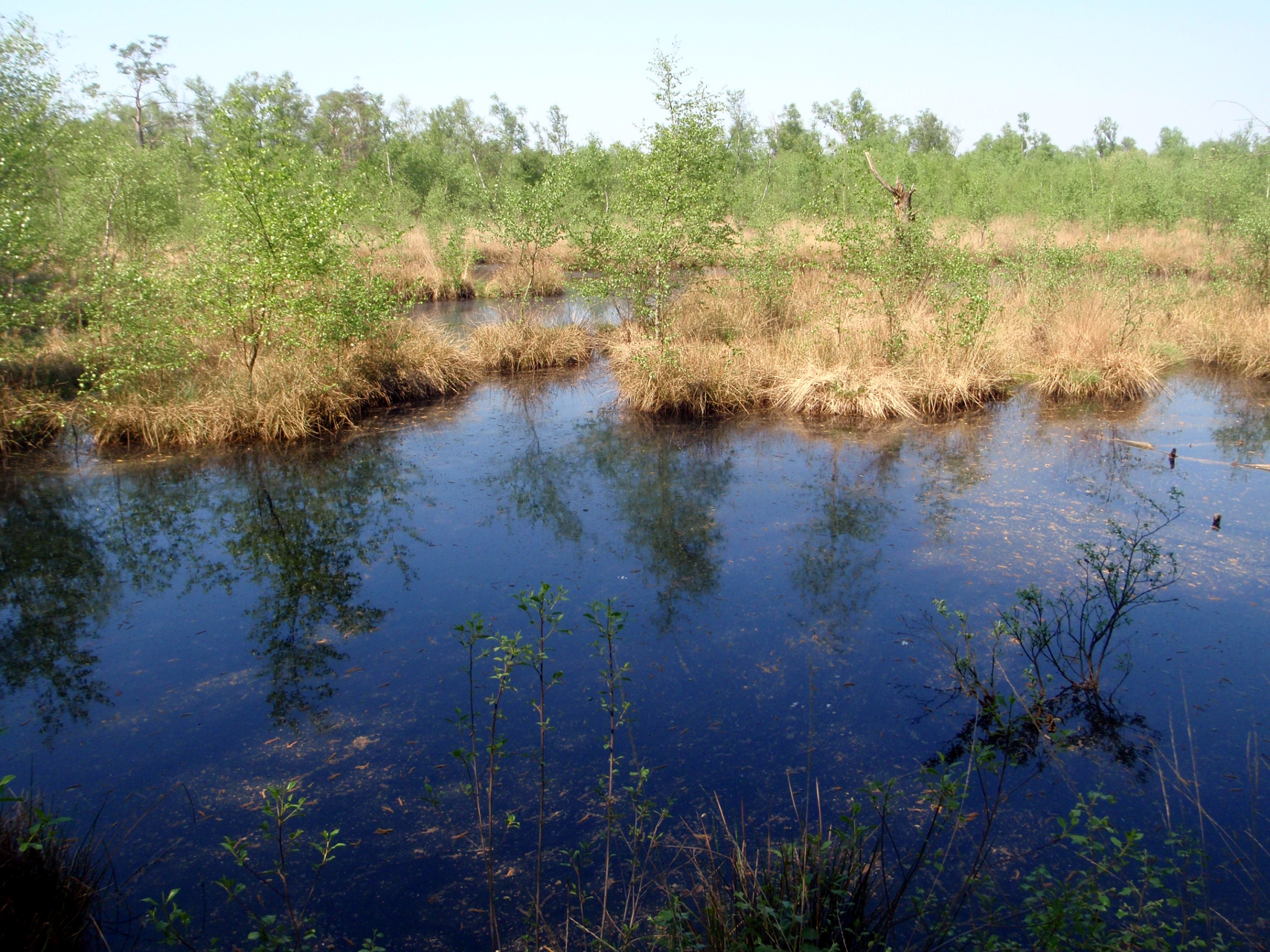 Das Burlo-Vardingholter Venn im Kreis Borken ist eines der bedeutendsten Moorgebiete des Westmünsterlandes. Das Foto zeigt, dass die seit den achtziger Jahren des letzten Jahrhunderts betriebenen Wiedervernässungsmaßnahmen gegriffen haben.